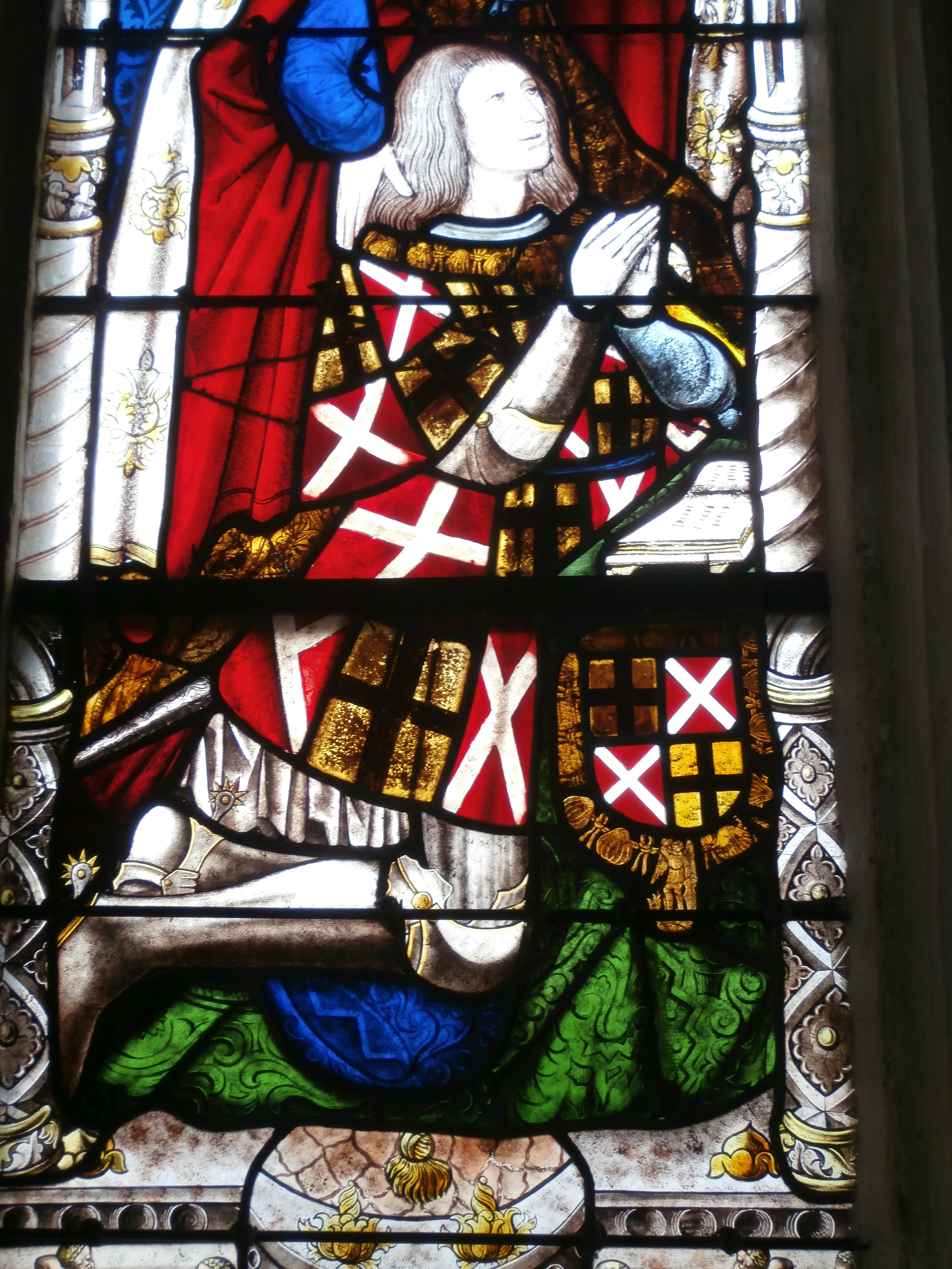 Portrait de Jean de Bruges- Eglise de Montmirail. ( Sarthe )